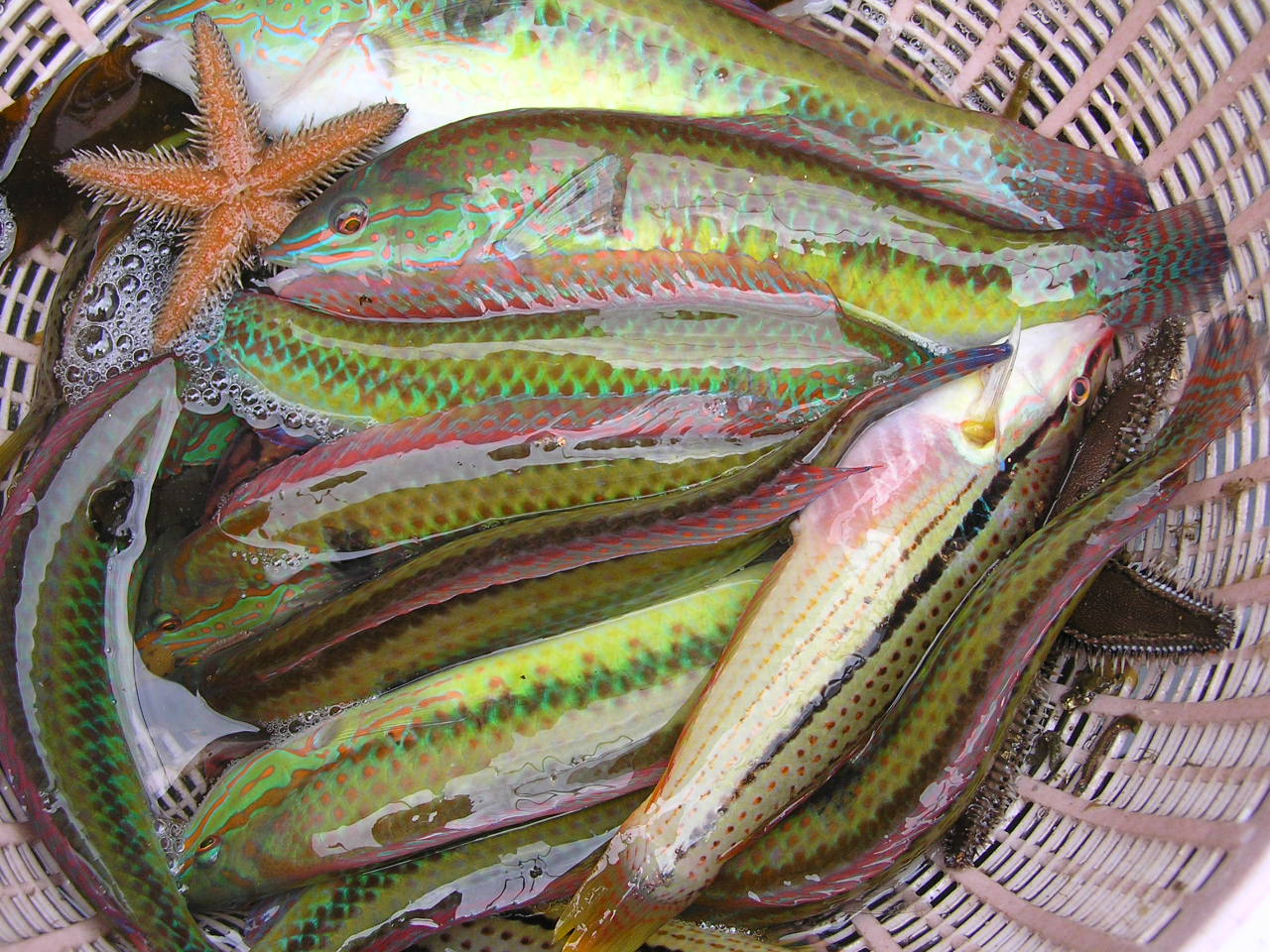 キュウセン（スズキ目ベラ亜目ベラ科キュウセン属）6233622.JPG